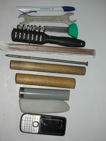 Предметы, с которыми можно использовать технику явары